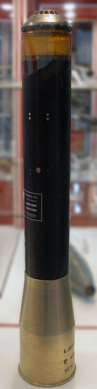 LAHAT missile